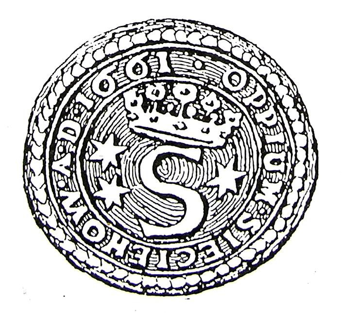 Herb Sieciechowa na starej pieczęci miejskiej